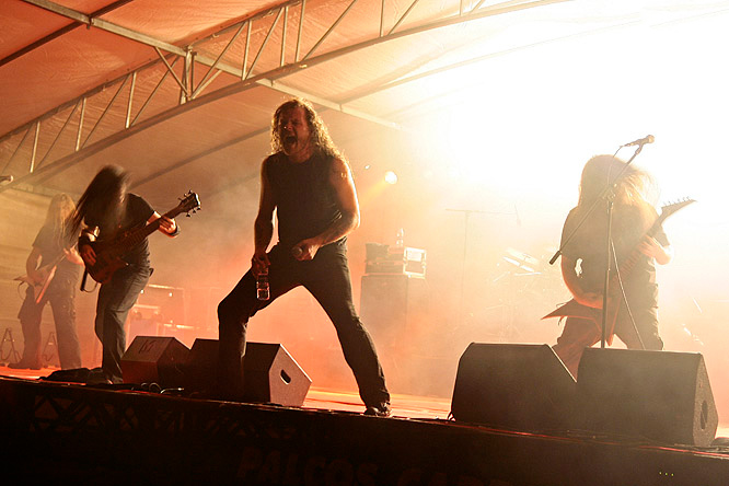 Susperia en Vigo durante el Festival Revoltallo de 2008